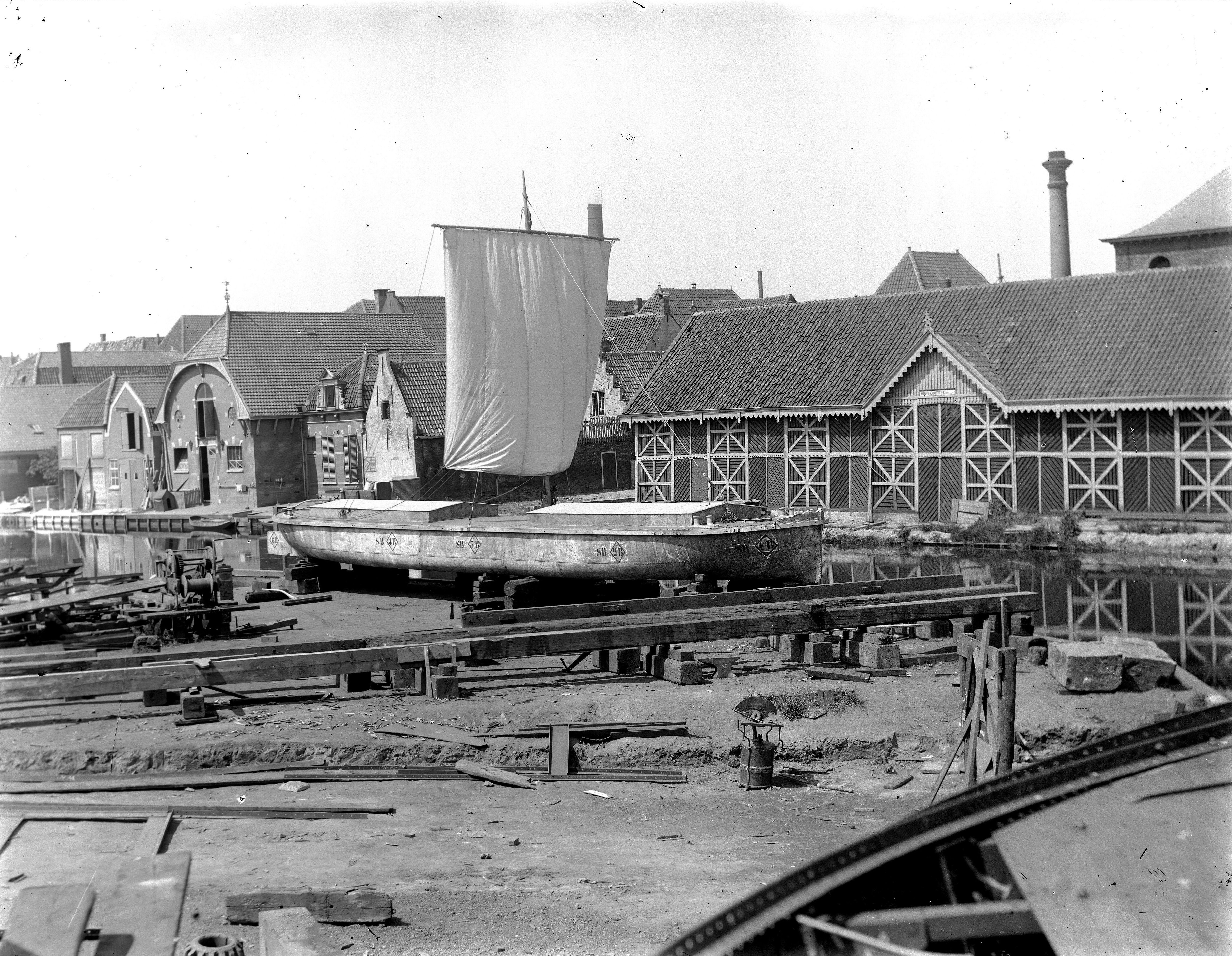 Zuidsingel 66, Koninklijke Nederlandse Grofsmederij. Schip onder zeil op de scheeps/reparatiehelling aan de zijde van de Binnenoostsingel.